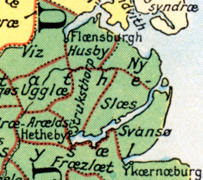 Herreder i Angel og Svans i Sydslesvig